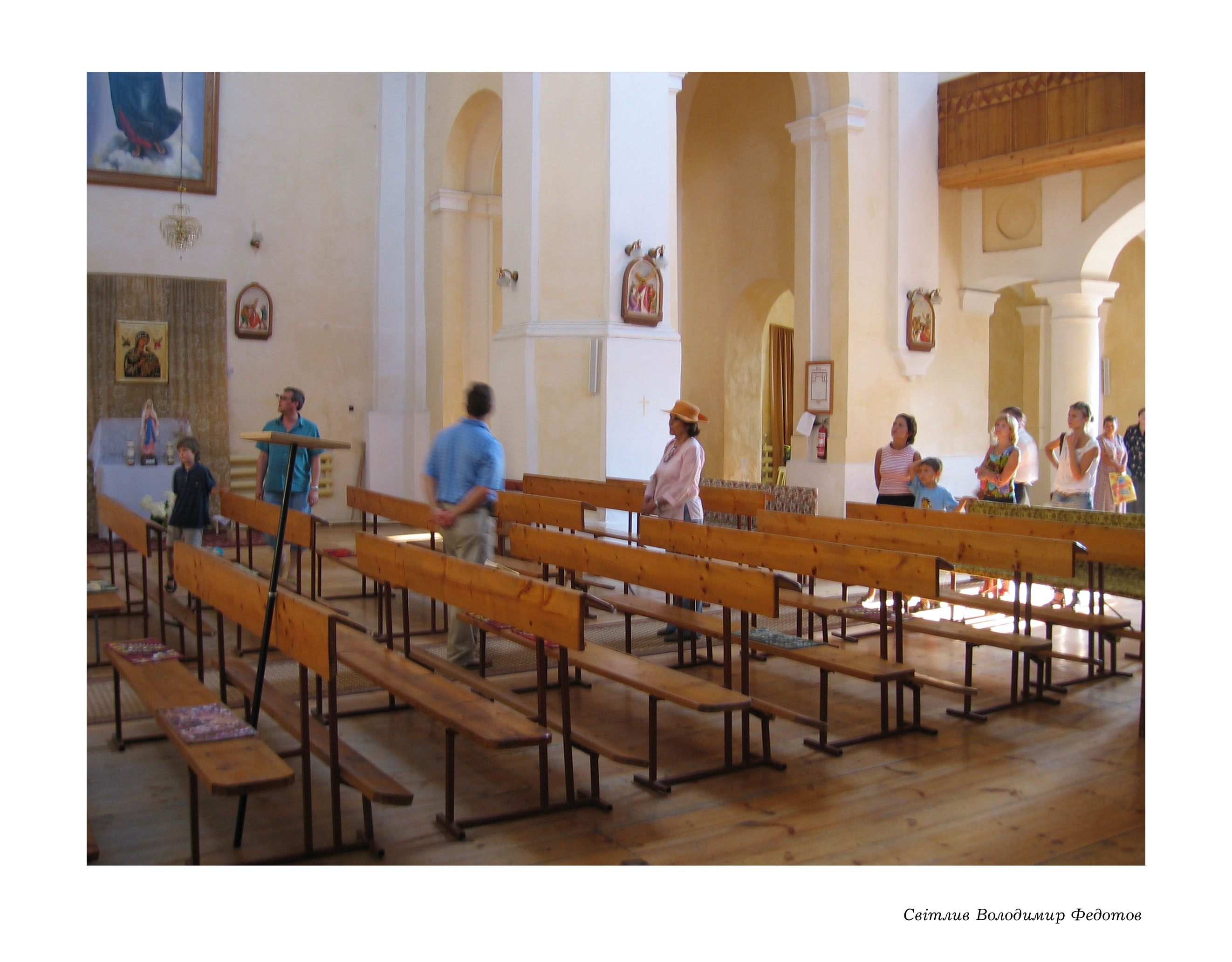 Під час відвідин костелу Святого Йосипа Павлом Санґушком і Клод де Ройс Санґушковою